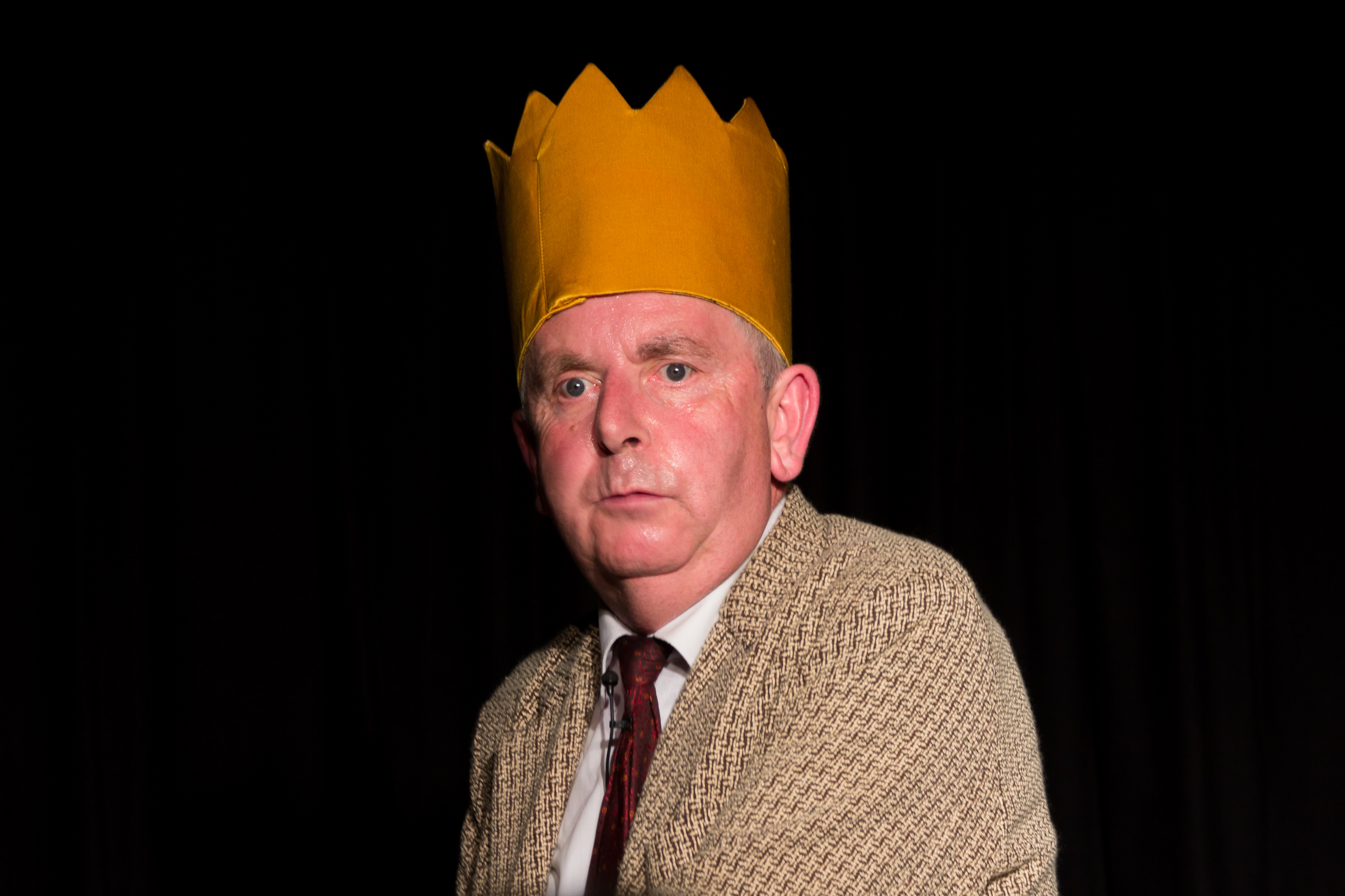 Erwin Grosche (* 25. November 1955 in Anröchte, Kreis Soest), deutscher Kabarettist, Schauspieler, Autor und Filmemacher aus Paderborn. Fotografiert in Ortenberg-Selters.